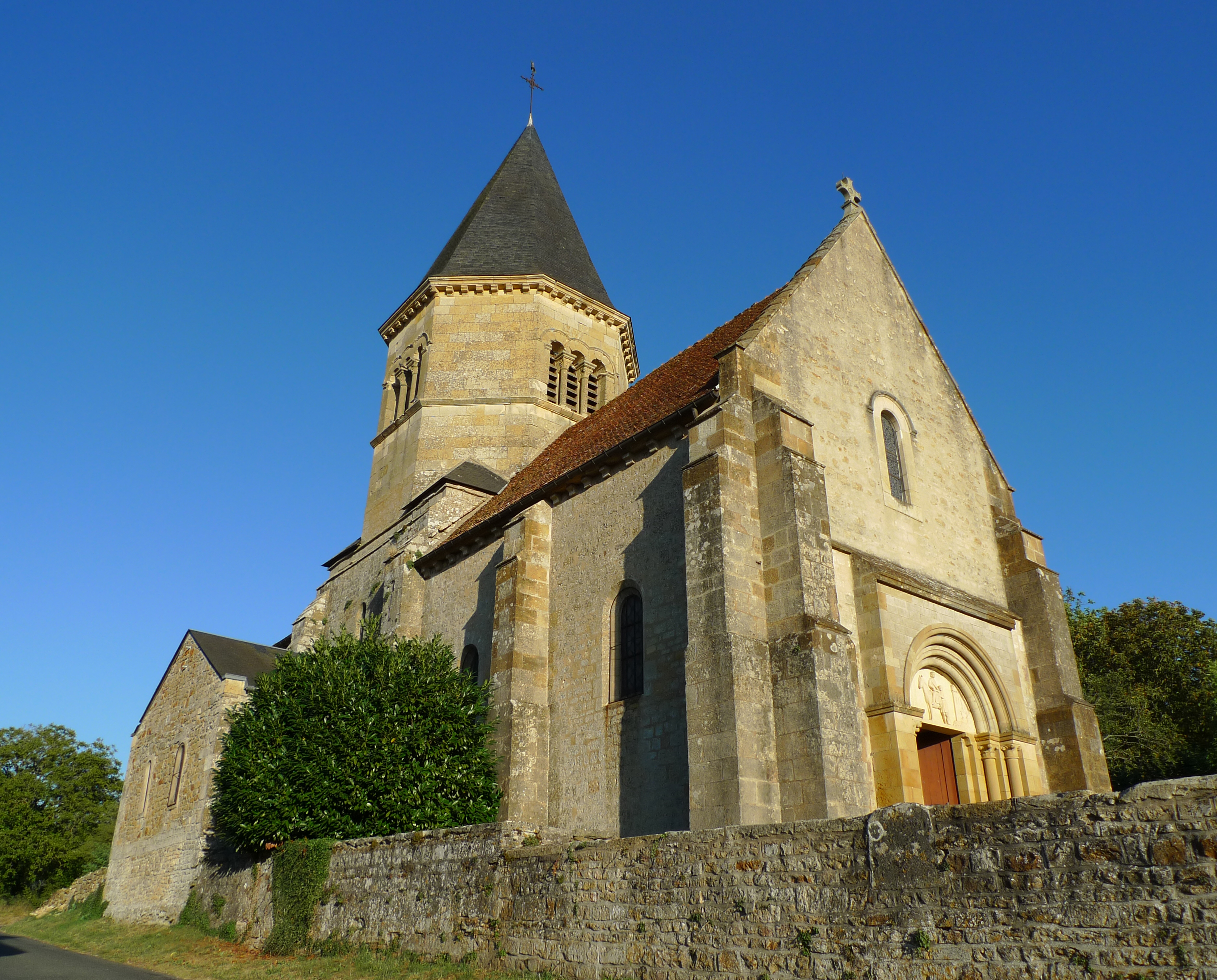 Église Saint-Fiacre d'Ourouër, (Classé, 1907) .